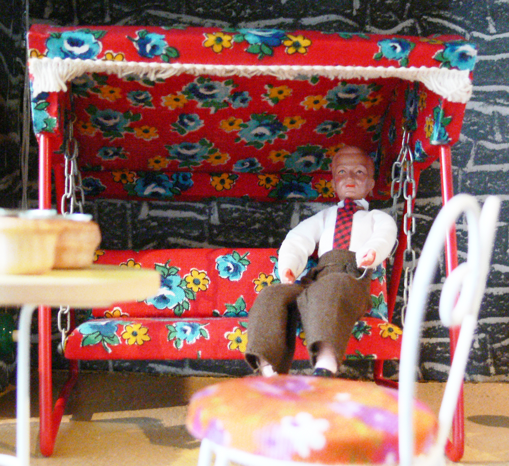 Hollywoodschaukel auf der Terrasse eines Puppenhauses der 1960er Jahre; Schlossmuseum Aulendorf (Landesmuseum Württemberg)